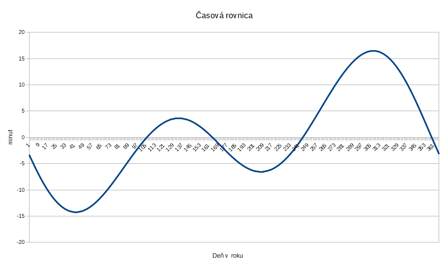 Časová rovnica